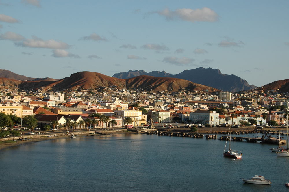 Porto Grande och staden Mindelo på ön Sao Vicente, Kap Verde Bilden tagen av Henryk Kotowski i november 2005.